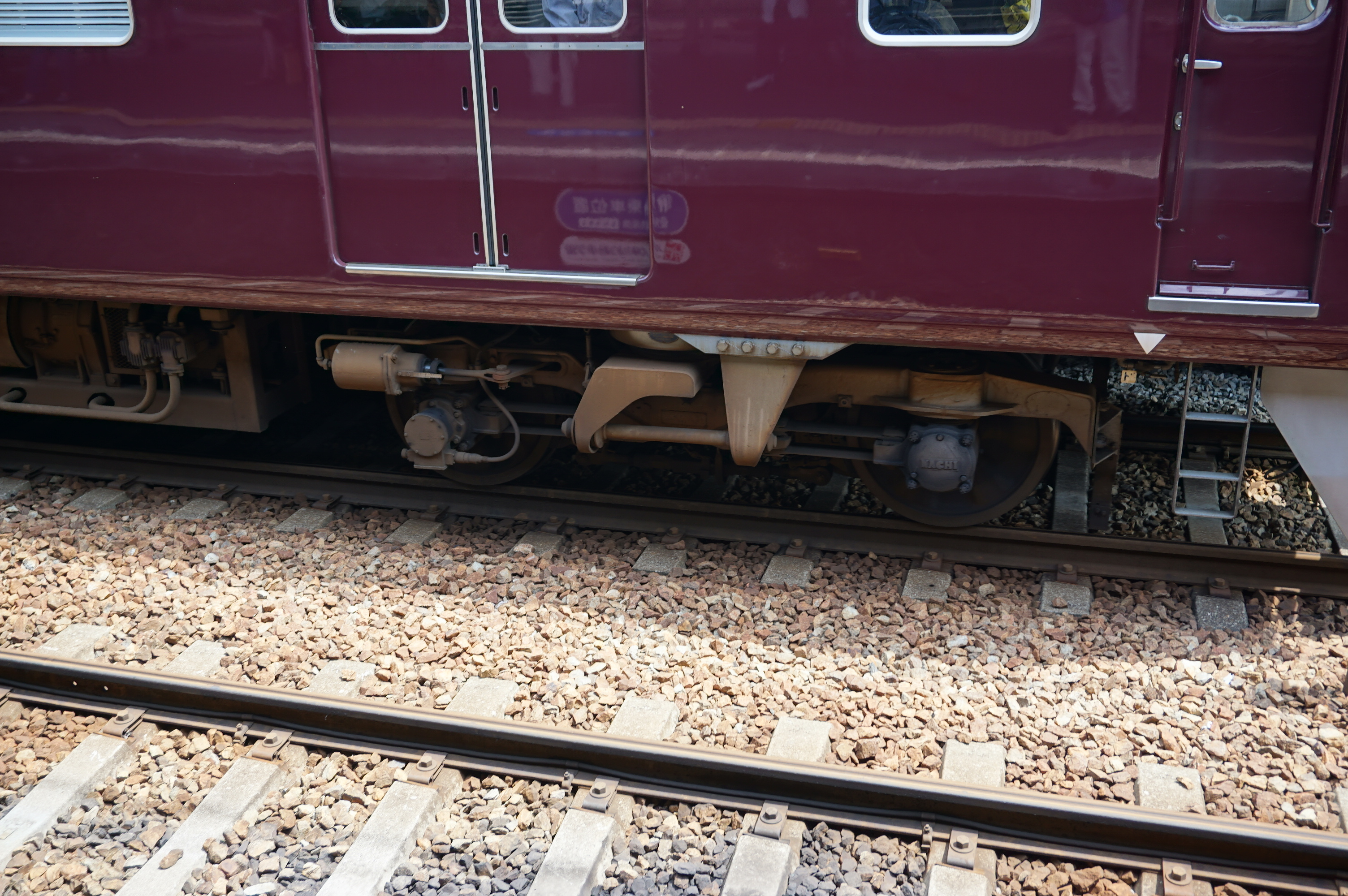 排障器部分の形状が異なる7123号車の台車 Sony ILCE-6000